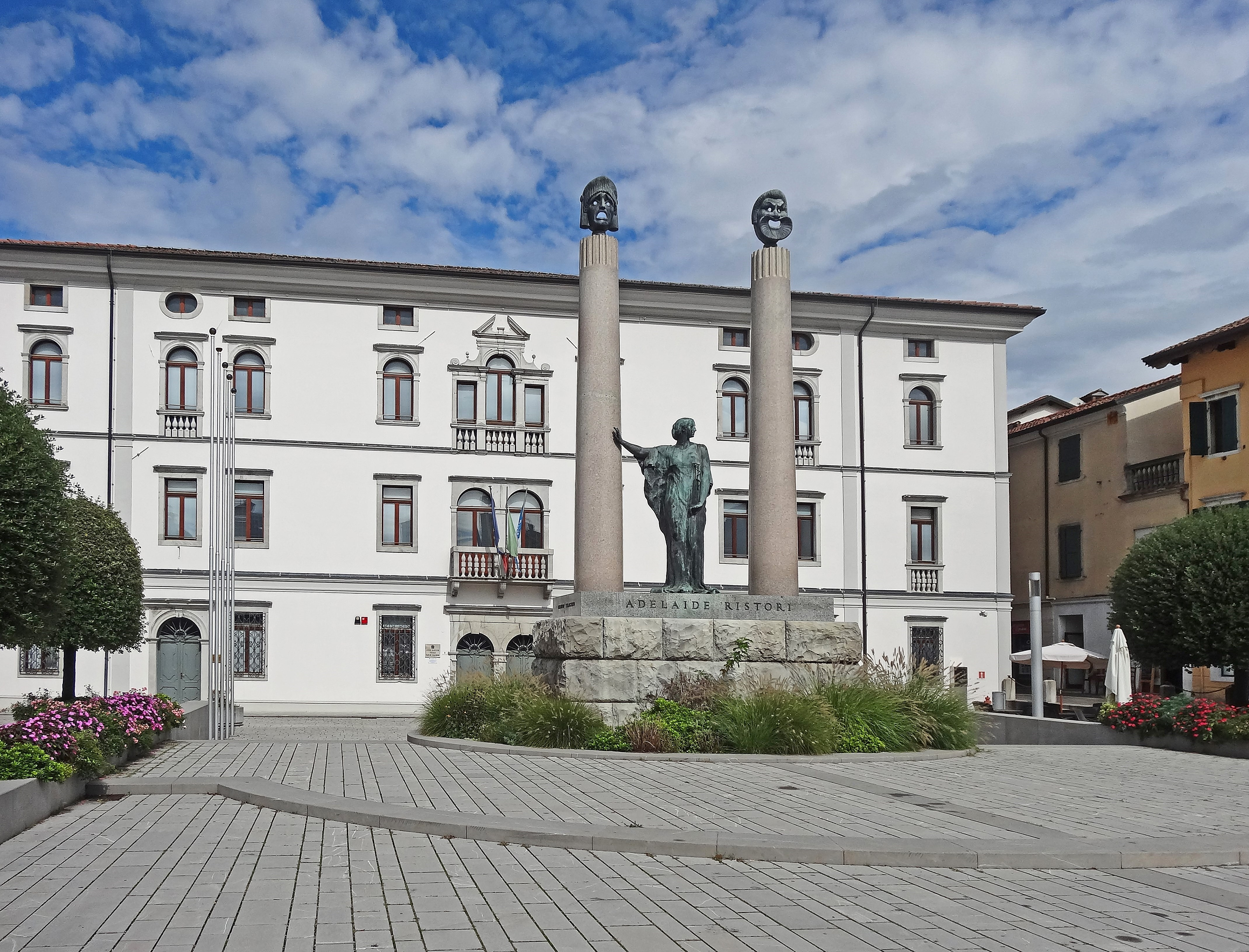 Cividale del Friuli, das Denkmal für die Schauspielerin Adelaide Ristori auf dem Foro Giulio Cesare